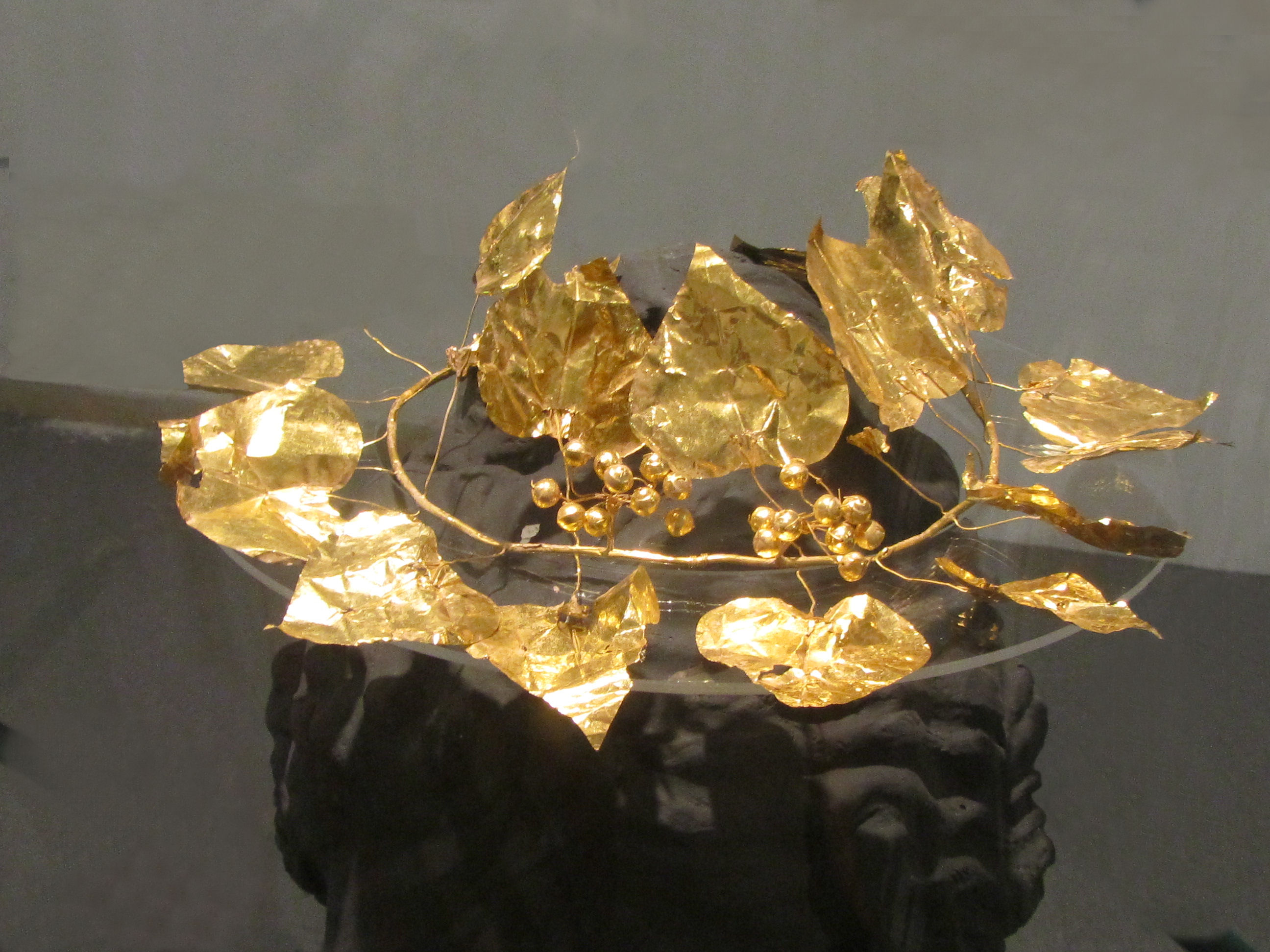 Goldgranz aus Soloi Grab 4, Archäologisches Museum Güzelyurt (Morphou)